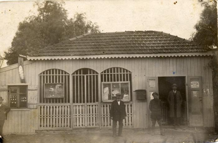 בית הדואר בפתח תקוה, הפוסטה, רחוב פינסקר. בתצלום: רבי דב בוליס, חיים סלונימסקי, משה ריבקינד